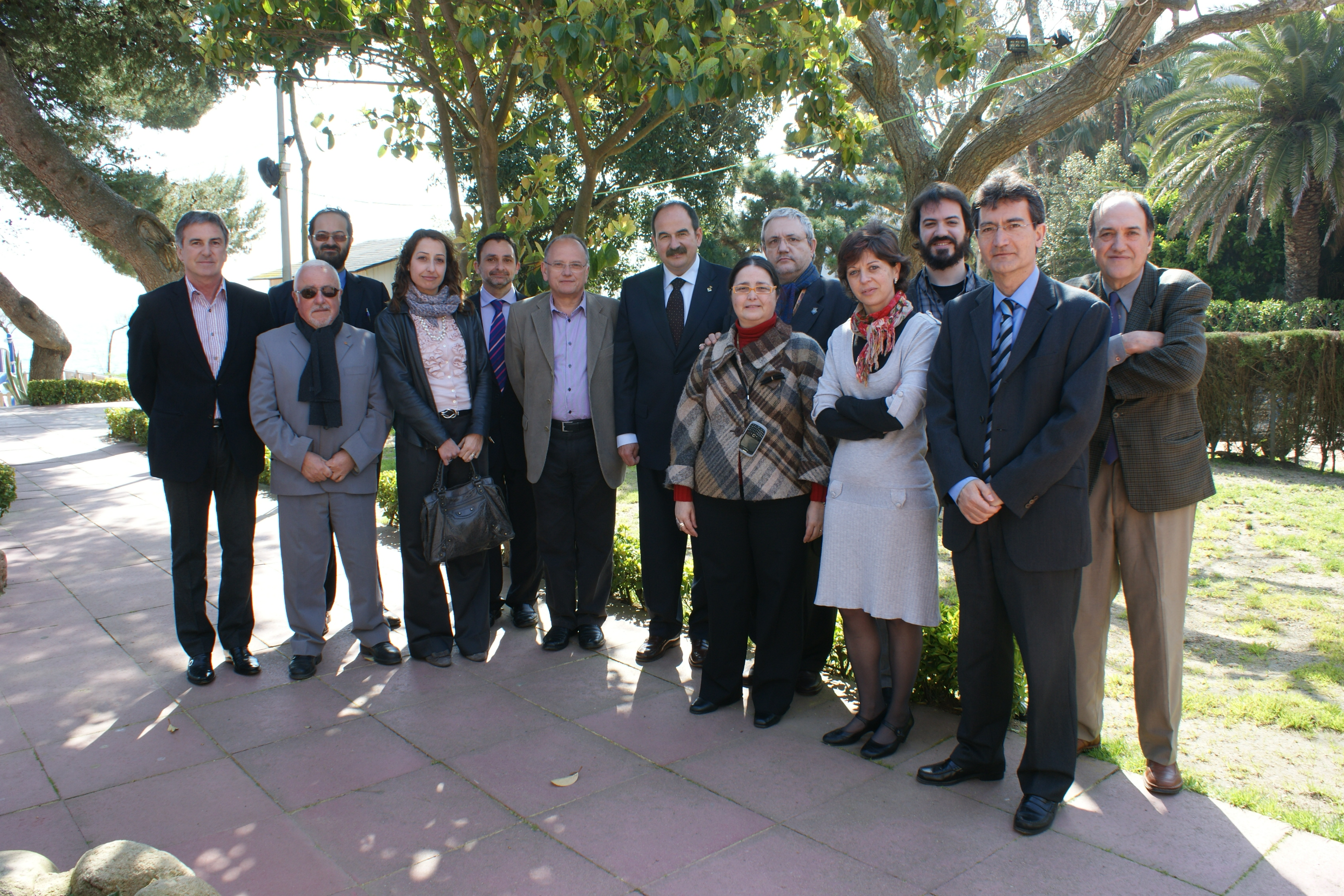 Photographie officielle de la II Rencontre Télévisuelle Eurorégionale, tenue à Lloret de Mar le 25 mars 2011. Au milieu de l'image, M. Xavier Crespo, maire de Lloret de Mar.